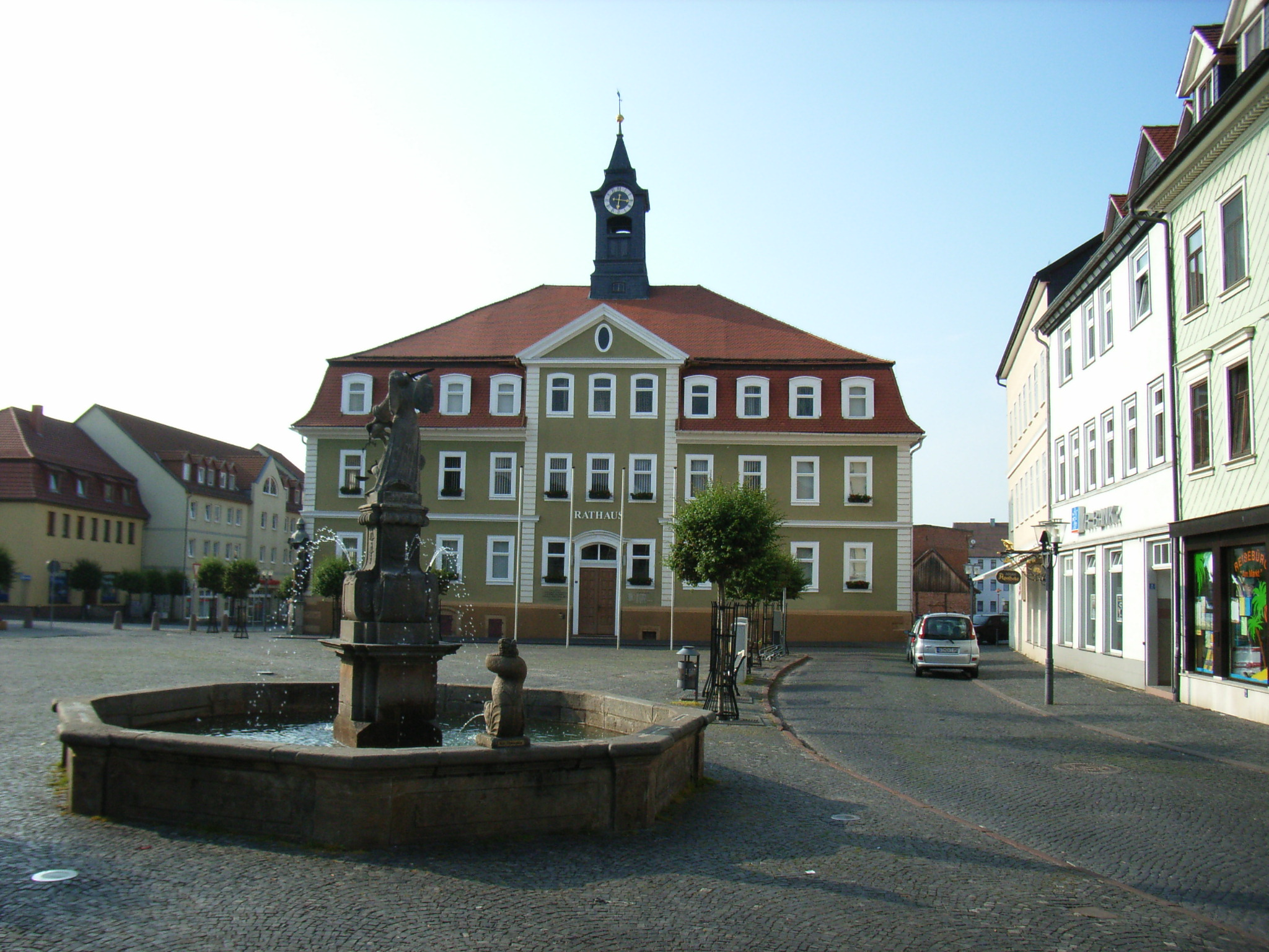 Ohrdruf, Rathaus